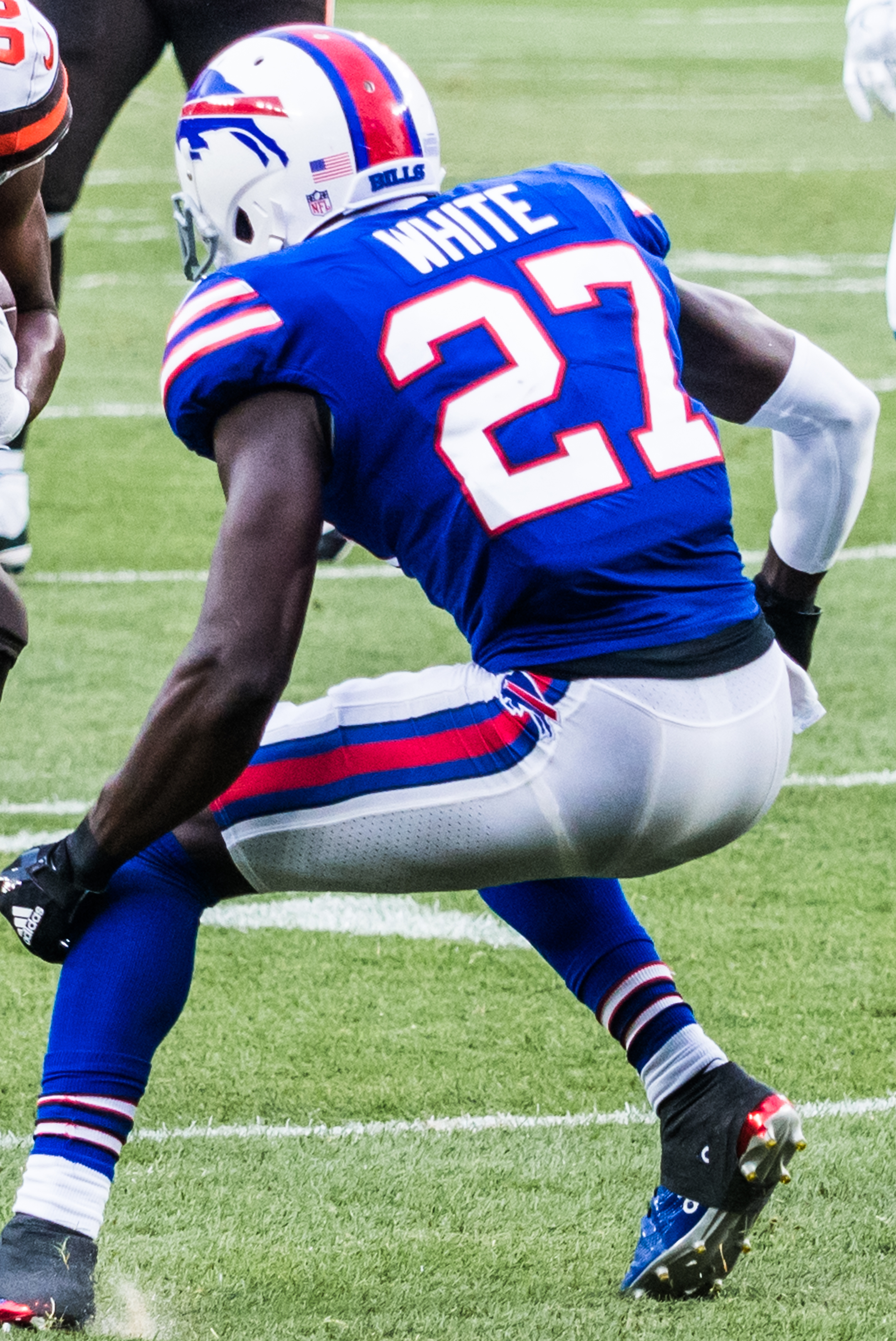 Darren Fells